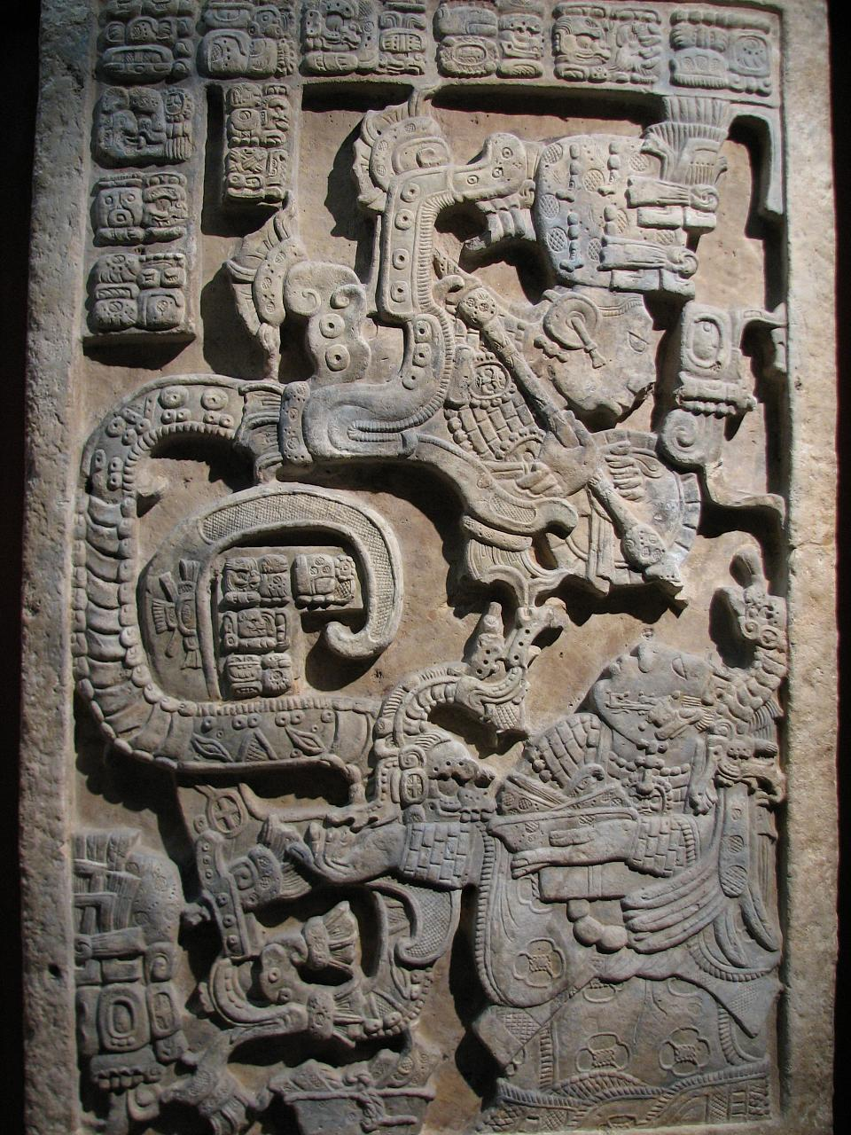 Inscripció Maya